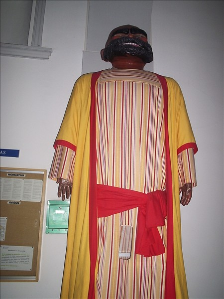 Gigantes de Alcalá de Henares